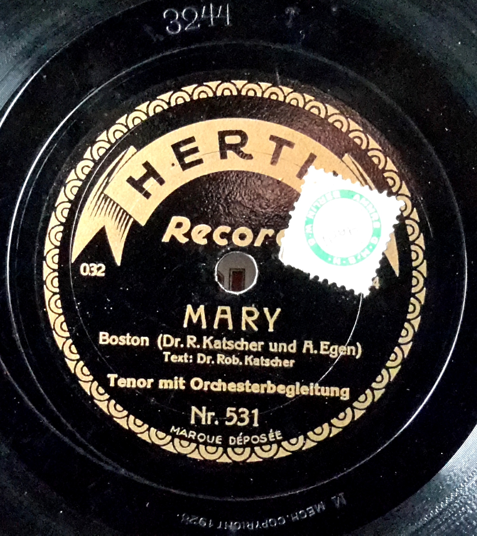 Label der Plattenmarke Hertie des damaligen Kaufhaus-Konzerns Hermann Tietz von 1928